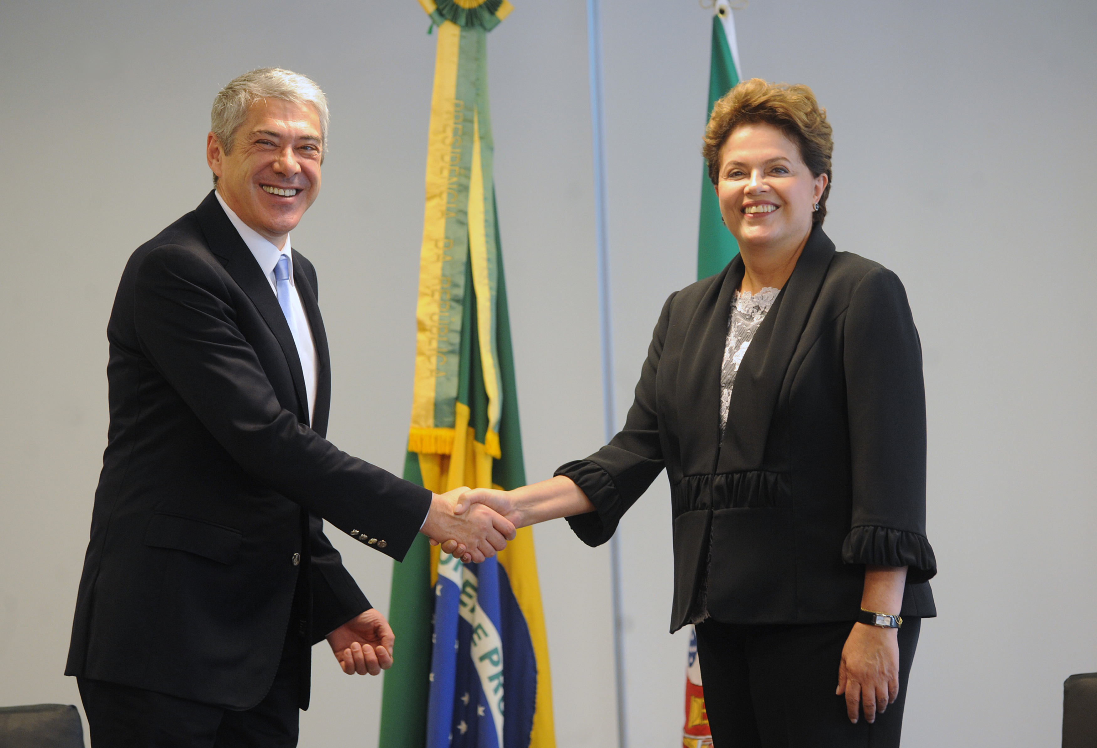 A presidente Dilma Rousseff recebe o primeiro-ministro de Portugal, José Sócrates, no Palácio do Planalto. Brasília, 2 de janeiro de 2011.